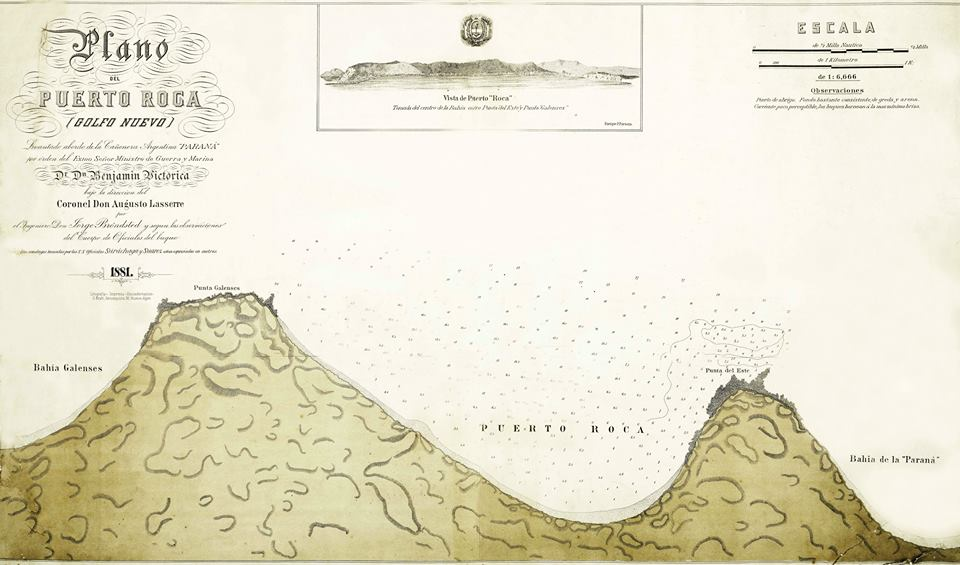 Plano de Puerto Roca, levantado a bordo de la cañonera Paraná, 1881. Tomada en el centro entre Punta del Este y Punta Galenses. Mapoteca II - 167 Puerto Roca está al sureste de Puerto Madryn. Punta Galenses ahora es Punta Cuevas.